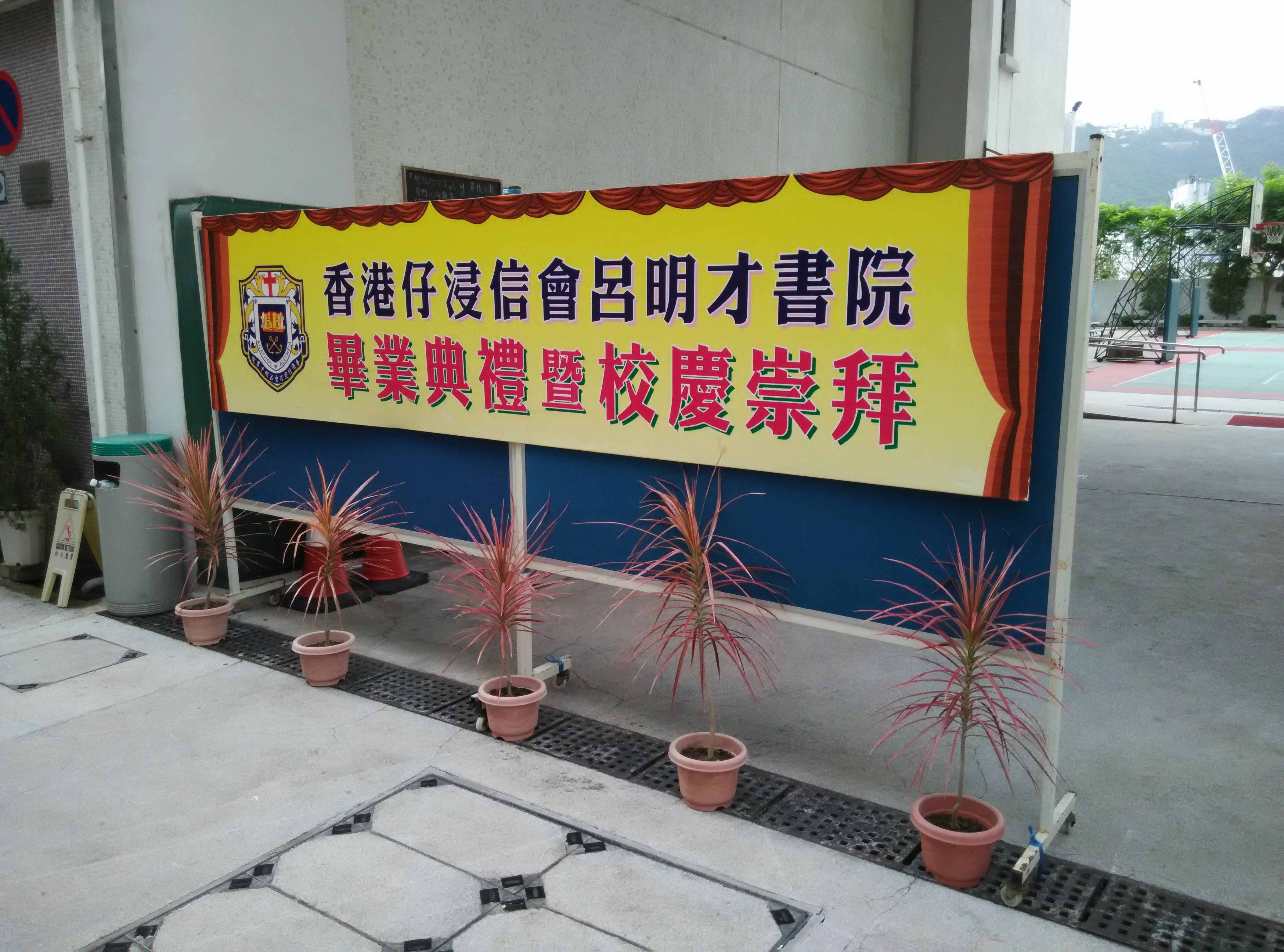 香港仔浸信會呂明才書院的畢業禮橫額